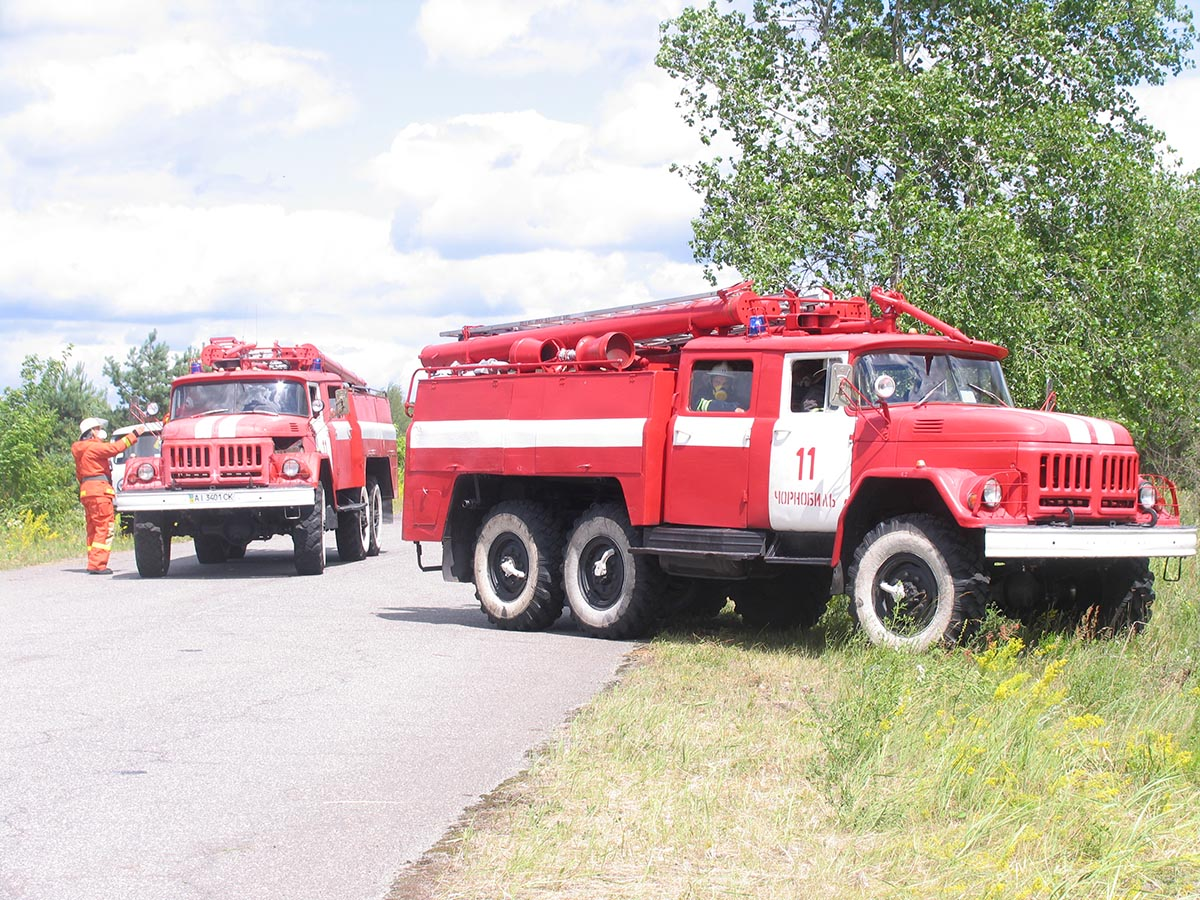 Шановні колеги, прийміть найщиріші вітання з нагоди Дня рятівника! Дата публікації 17 вересня 2019.Опубліковано у НОВИНИ Це свято об’єднує людей відважних, мужніх та сильних, які готові прийти на допомогу всім, хто опинився у біді, запобігти і ліквідувати надзвичайні ситуації, захистити наше здоров’я і життя. Дякуємо за Вашу самовідданість та сміливість, адже якщо у зоні виникає пожежа, то Ви першими вступаєте в бій з вогняною стихією і завжди виходите з нього переможцями! У цей святковий день бажаємо Вам міцного здоров’я, миру Вам та Вашим сім’ям, злагоди та достатку і якомога менше тривожних викликів.